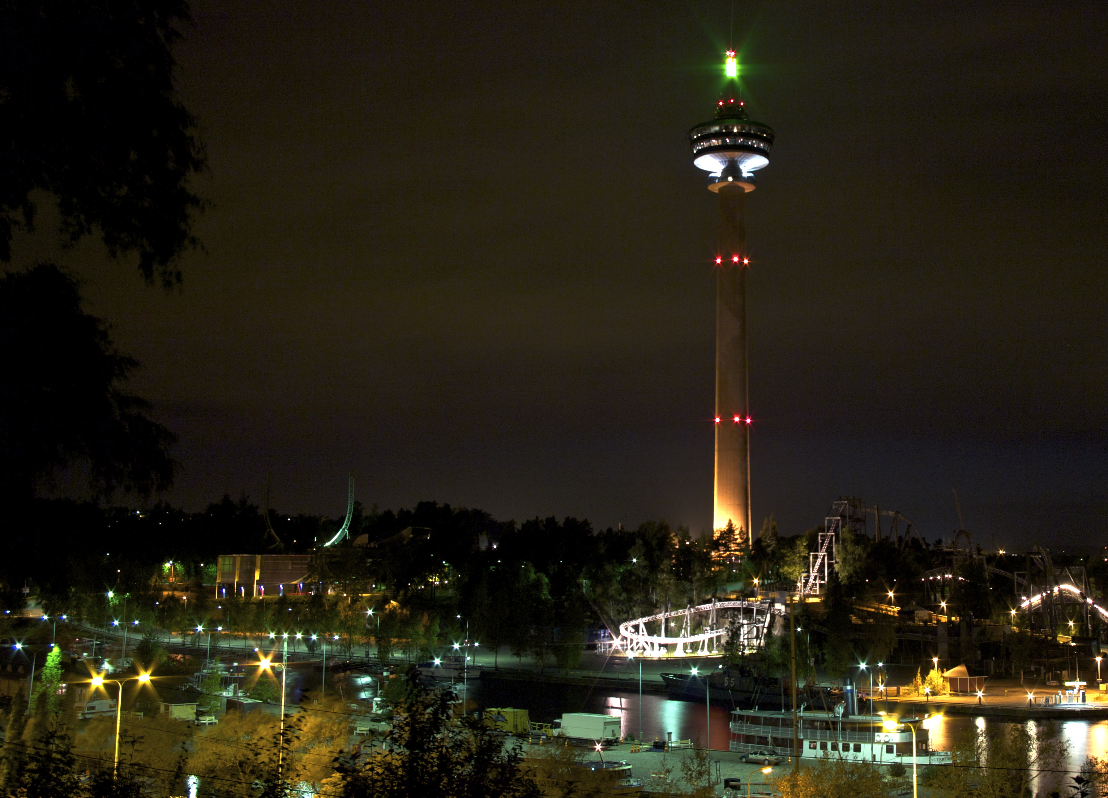 Näsinneula yöllä